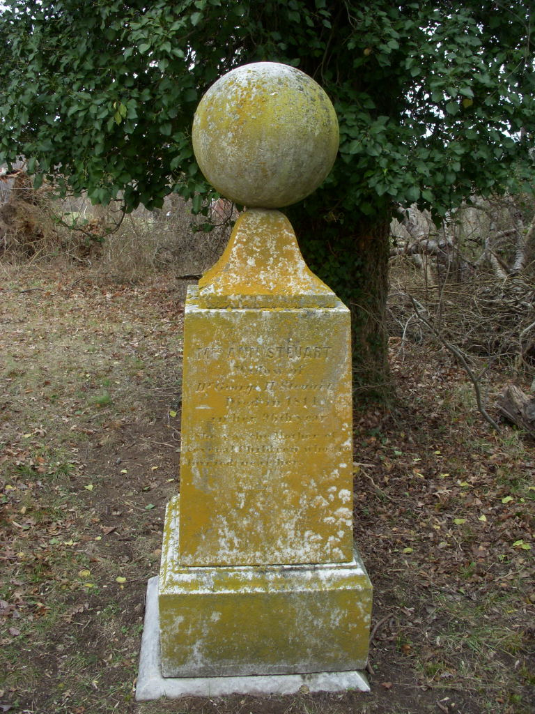 Obelisk at Dodon, Maryland